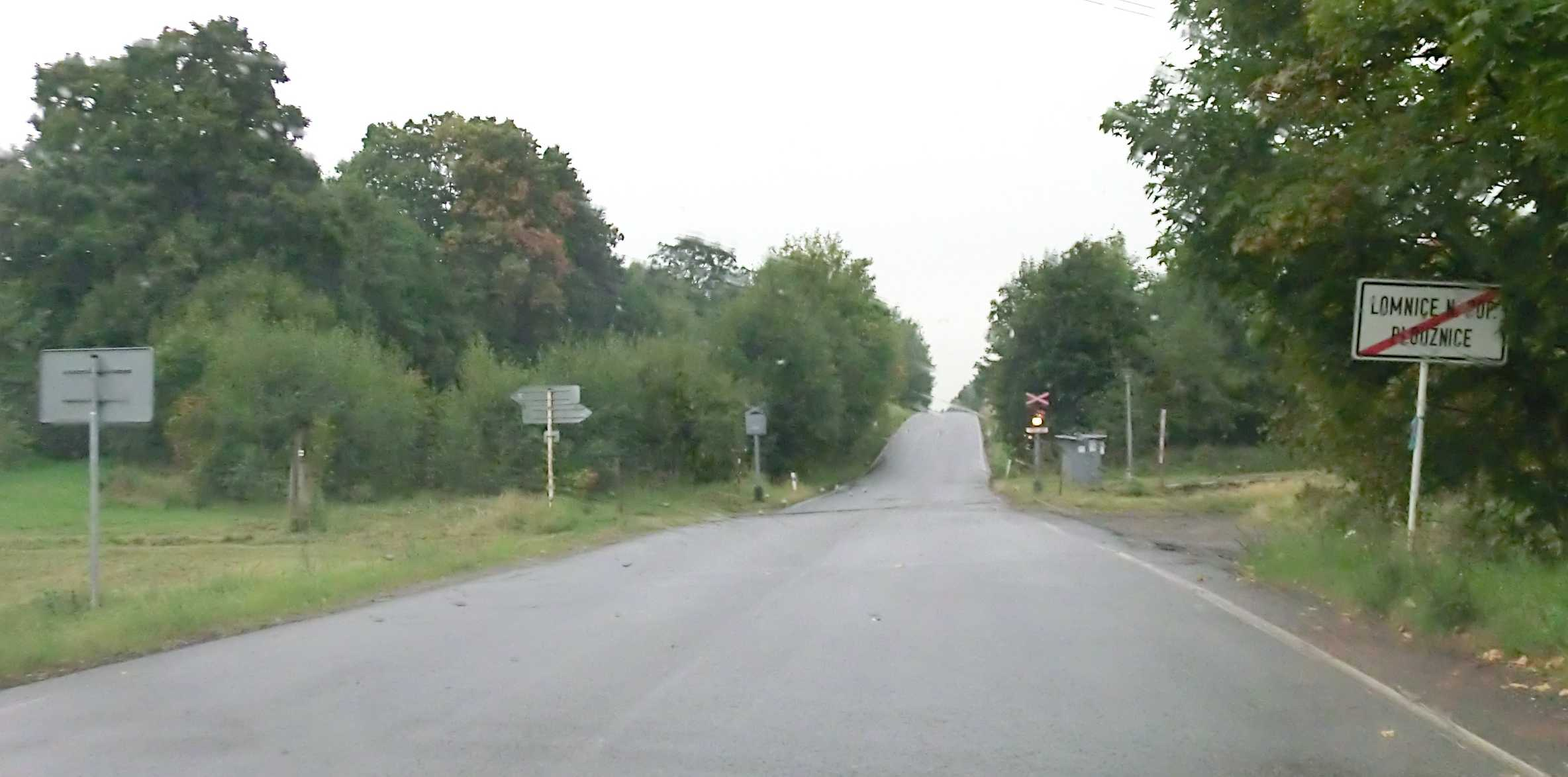 Ploužnice a železniční přejezd silnice II/286 přes železniční trať 064 těsně za prudkou levotočivou zatáčkou. Zcela vlevo, mezi vzrostlými a mladšími stromy, vedla původní stopa této silnice - byla přeložena asi v 50. nebo 60. letech XX. století.